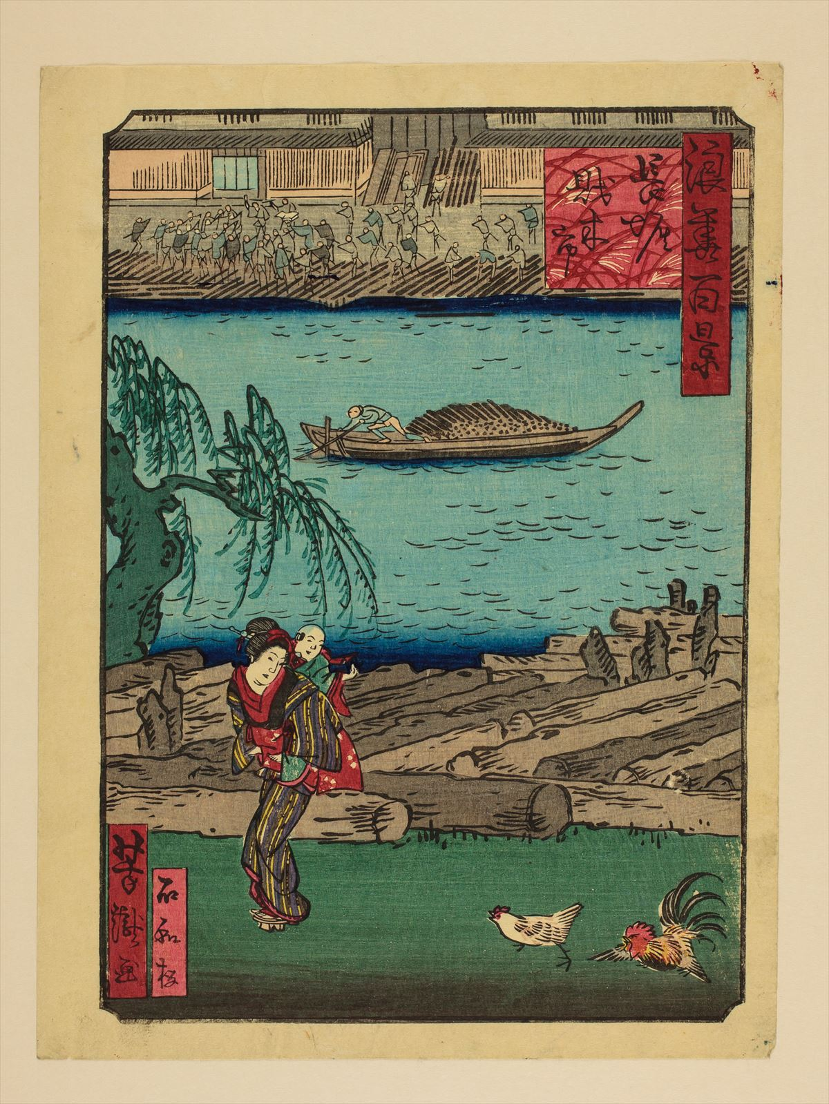 1800年代。里の家芳瀧/画。浪花百景 102枚のうちの1枚。大阪市立中央図書館蔵。